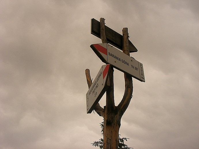 Węzeł szlaków na Magurce Radziechowskiej